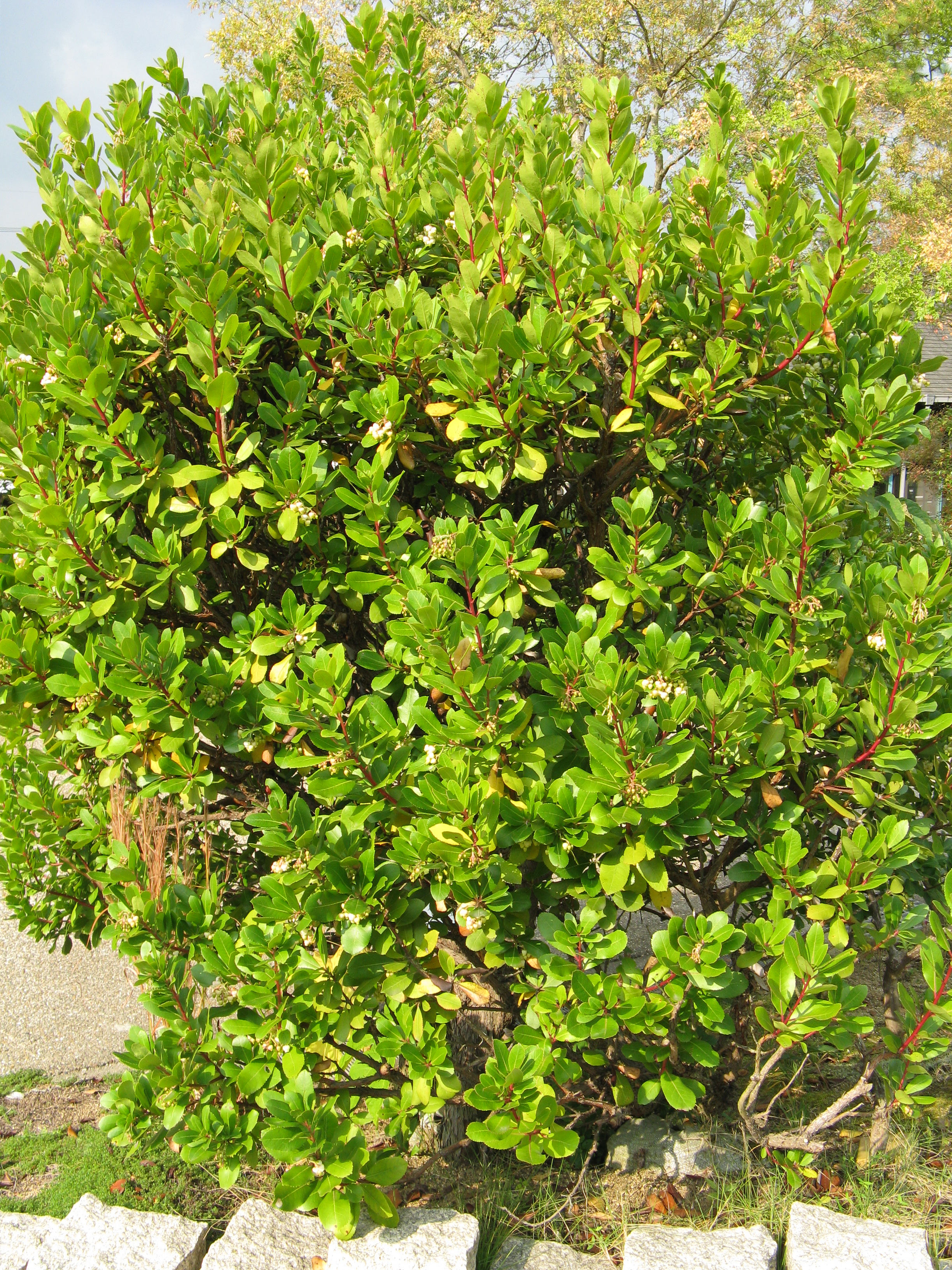 Arbutus unedo